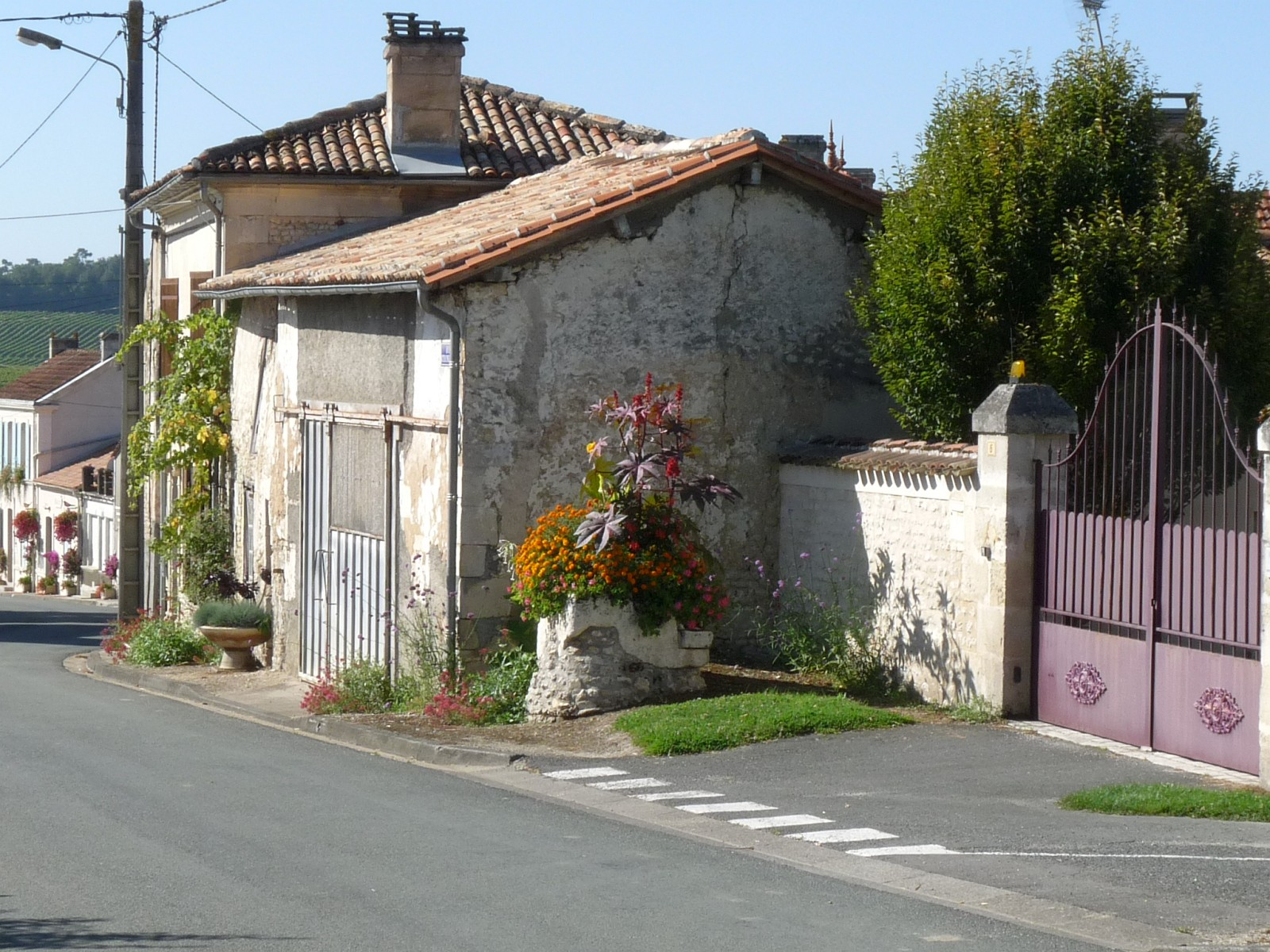 Rue arrivant au village, Arthenac, Charente-Maritime, France